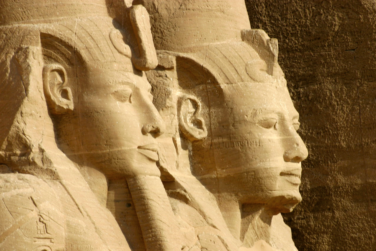 Detalle del exterior del templo de Ramsés II en Abu Simbel.